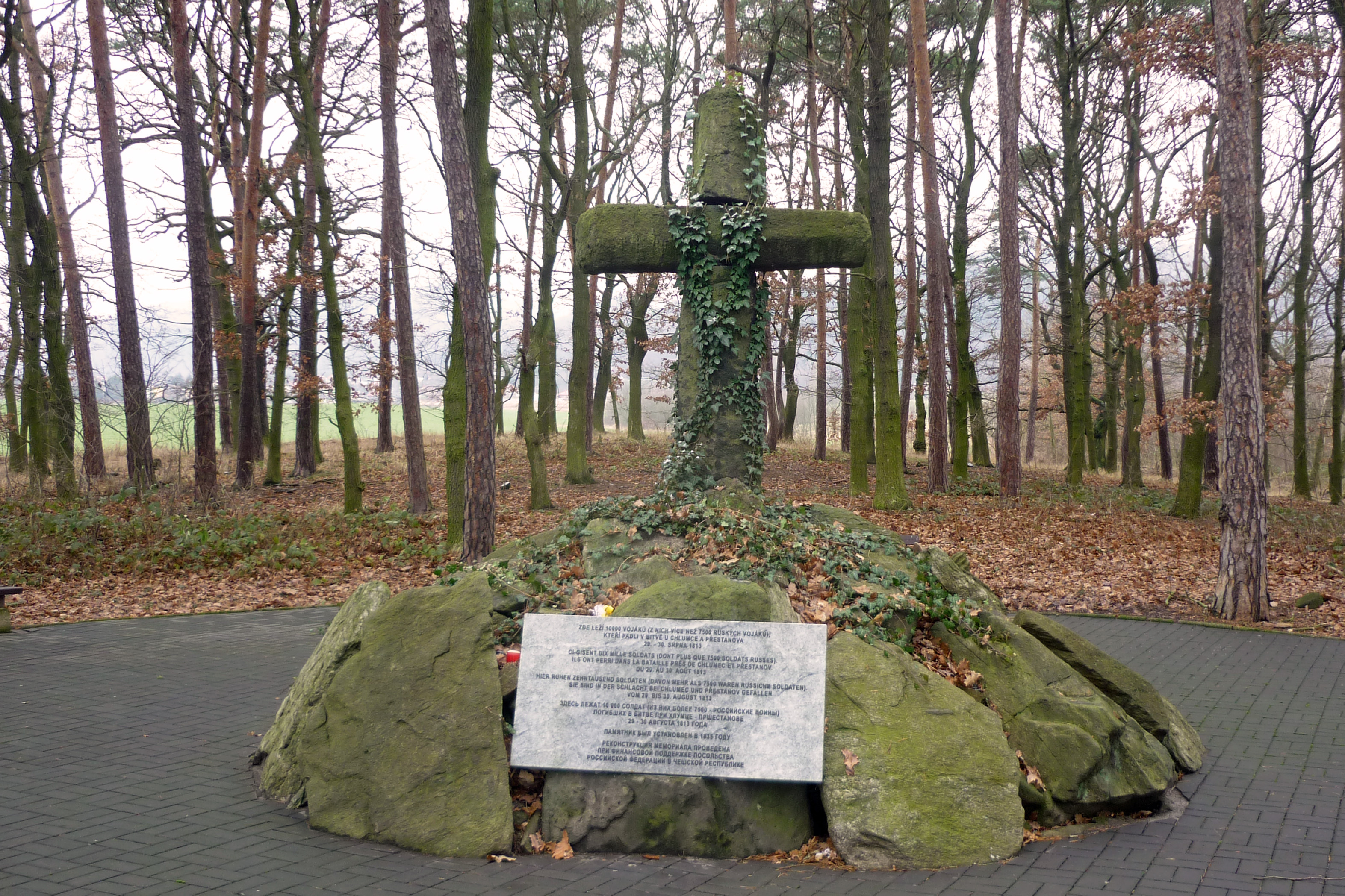 Gedenkstätte am Massengrab der 10000 Gefallenen bei der Schlacht von Kulm 1813 in Priesten (Přestanov)